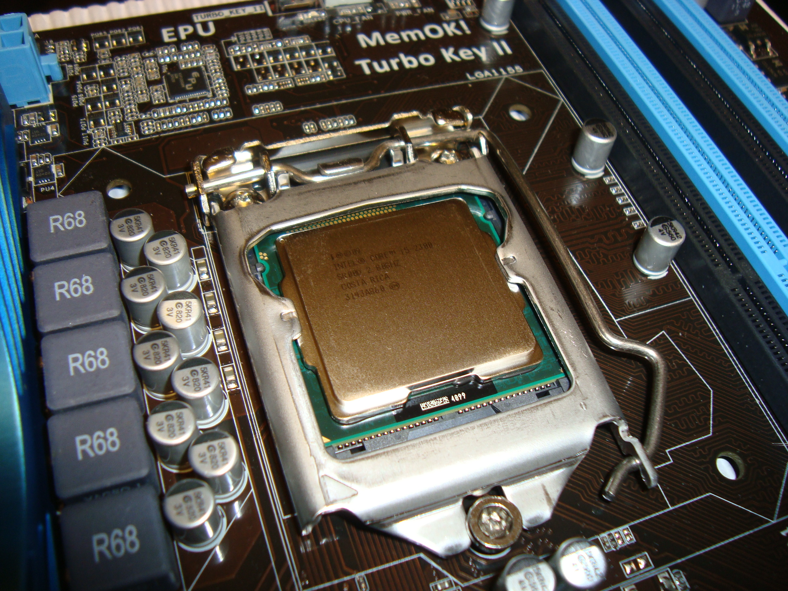 Процессор Intel i5-2300, установленный в разъём LGA1155 на материнской плате ASUS P8H67